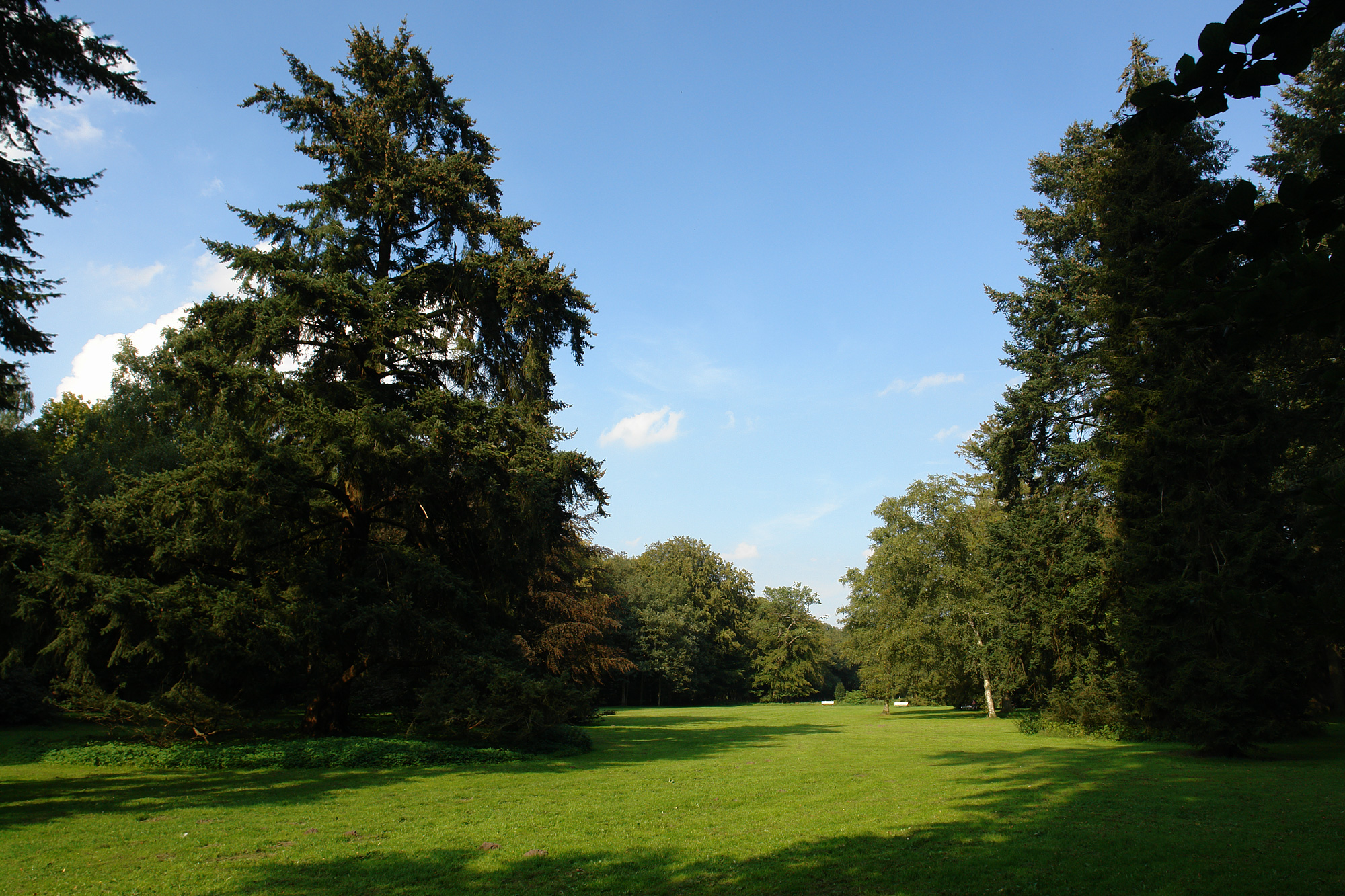 Muhles Park, Böving'sches Landgut, Landgut Muhle in Bremen, Oberneulander Landstraße 65, 67.Die Gesamtanlage ist ein geschütztes Kulturdenkmal in der Freien Hansestadt Bremen, mit der Nr. 0936,T beim Landesamt für Denkmalpflege registriert.